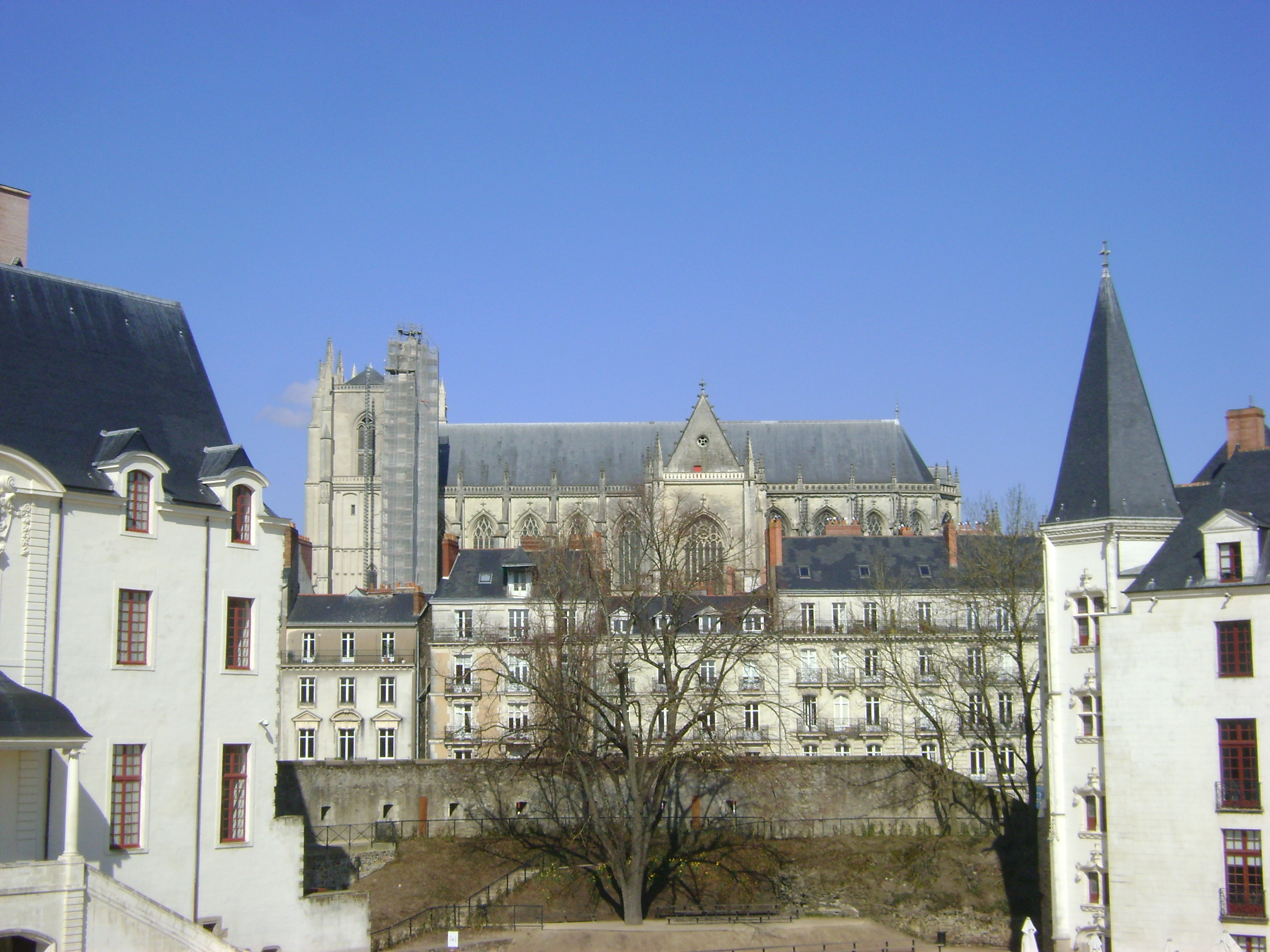 La Cathédrale Saint-Pierre et Saint-Paul de Nantes. La Cathédrale vue du château. .